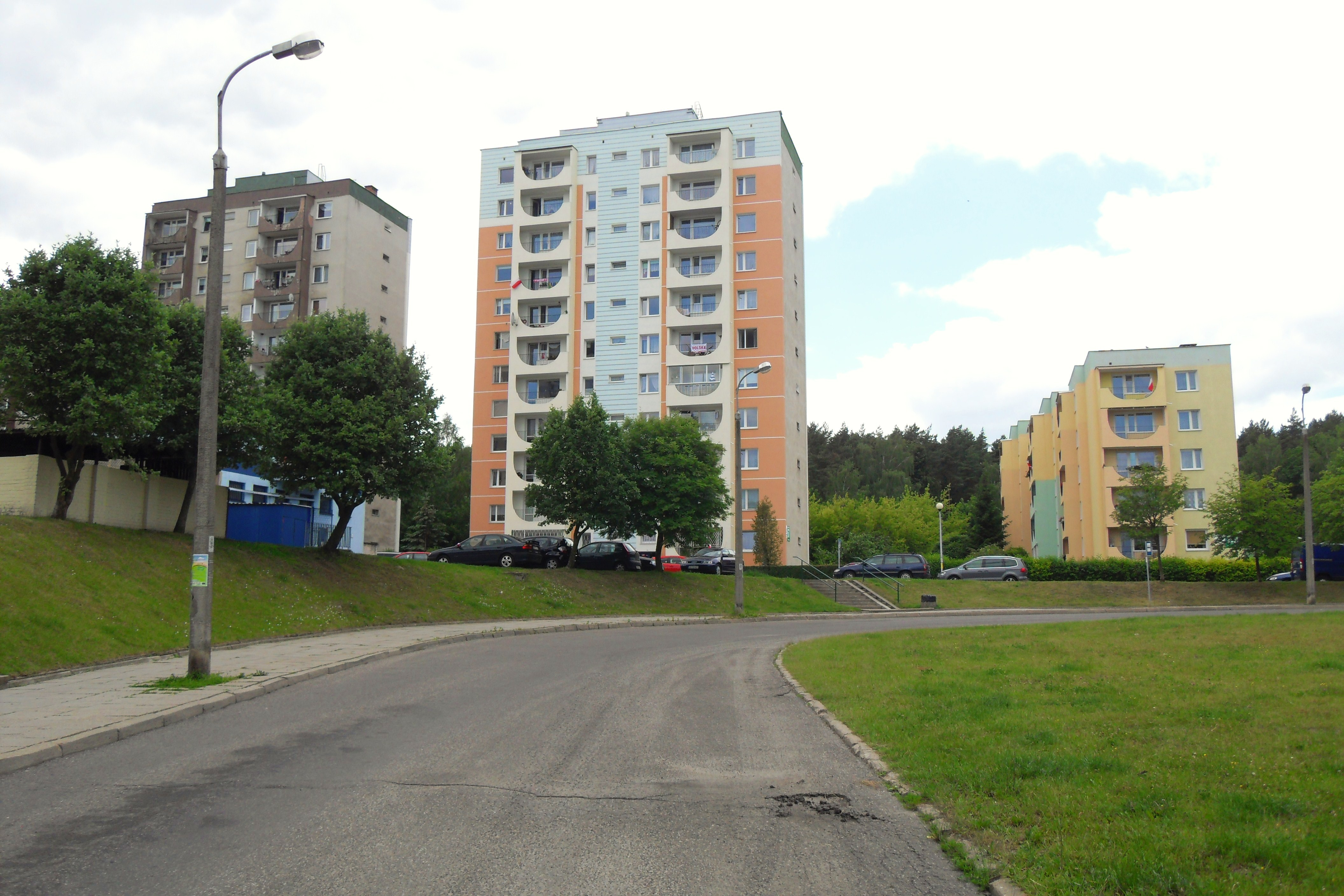 Gdańsk Niedźwiednik. Ul. Góralska, od lewej nr: 65, 67 i 69.